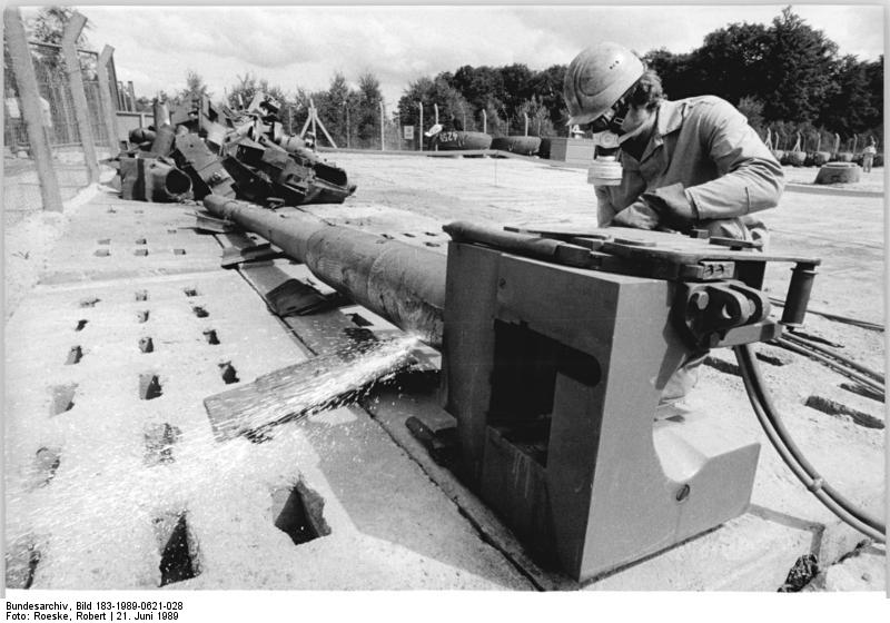 ADN-ZB Roeske 21.6.89 Bez. Dresden: Abrüstung - Entsprechend der von Erich Honecker zu Jahresbeginn angekündigten einseitigen Abrüstungsschritte der DDR, begann in NVA-Einrichtungen im Kreis Görlitz die Zerlegung und Verschrottung von Panzern. Die T-55 A waren Ende April aus sechs Panzerregimentern der NVA abgezogen worden, die bis Oktober dieses Jahres aufgelöst werden. Zur Zeit befinden sich 124 Panzer auf dem Demontageplatz Charlottenhof.